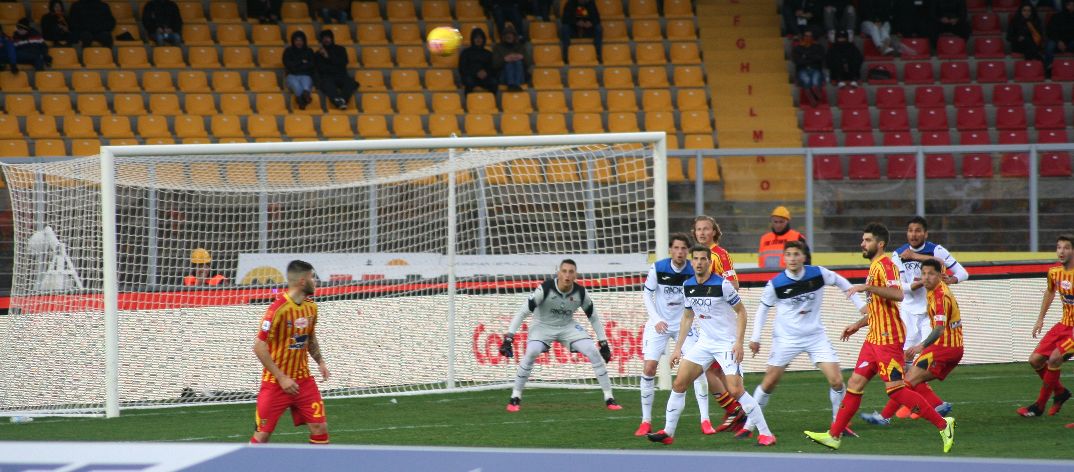 Azione di attacco del Lecce contro l'Atalanta, nella partita disputata allo Stadio di Via del Mare di Lecce il 1° marzo 2020